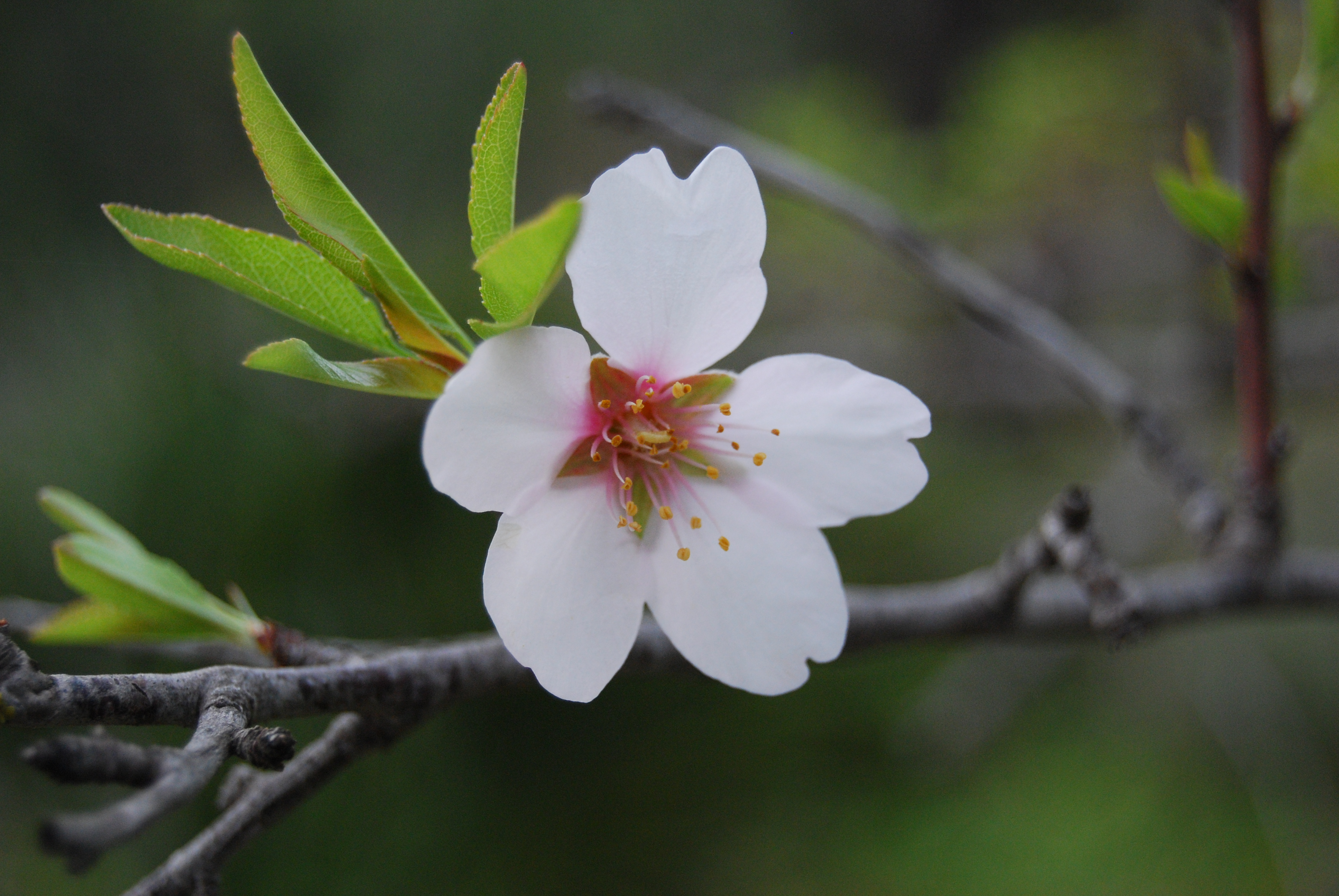 Flor de almendro en primavera 2009